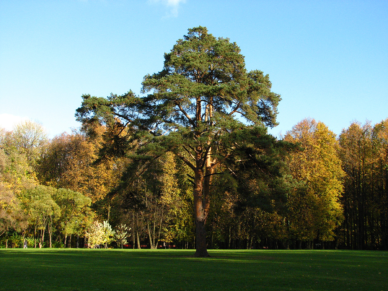 Дворцовая поляна в Царицынском пейзажном парке